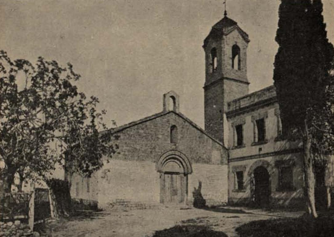 Església antiga de Santa Eulàlia de Provençana (l'Hospitalet de Llobregat)